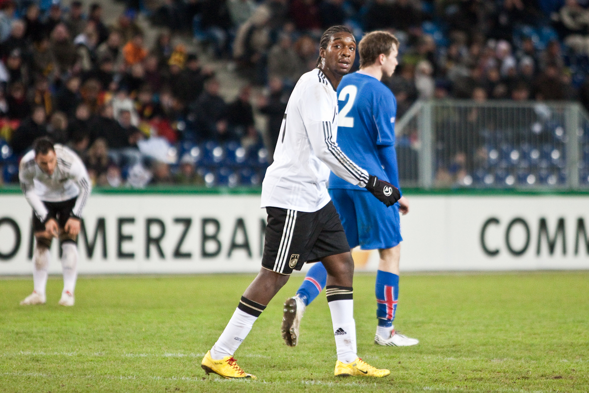 Richard Sukuta-Pasu im U-21-Länderspiel Deutschland gegen Island in Magdeburg.